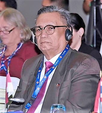 Abdulmaid Kiram Muin, Botschafter der Philippinen in Osttimor)